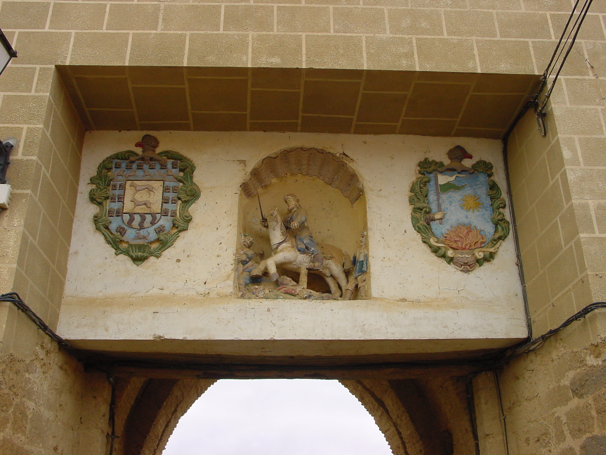 Valderas (León, España). El Arco de Santiago se encuentra al final de la calle de Santiago. Es mudéjar y conserva su estilo por la parte de fuera donde puede verse el arco rodeado de un alfiz. Por la parte de dentro, hacia la calle, el arco está bastante desvirtuado a causa de las sucesivas modificaciones que se le fueron haciendo. Autor de la imagen: Lourdes Cardenal, enero 2006.